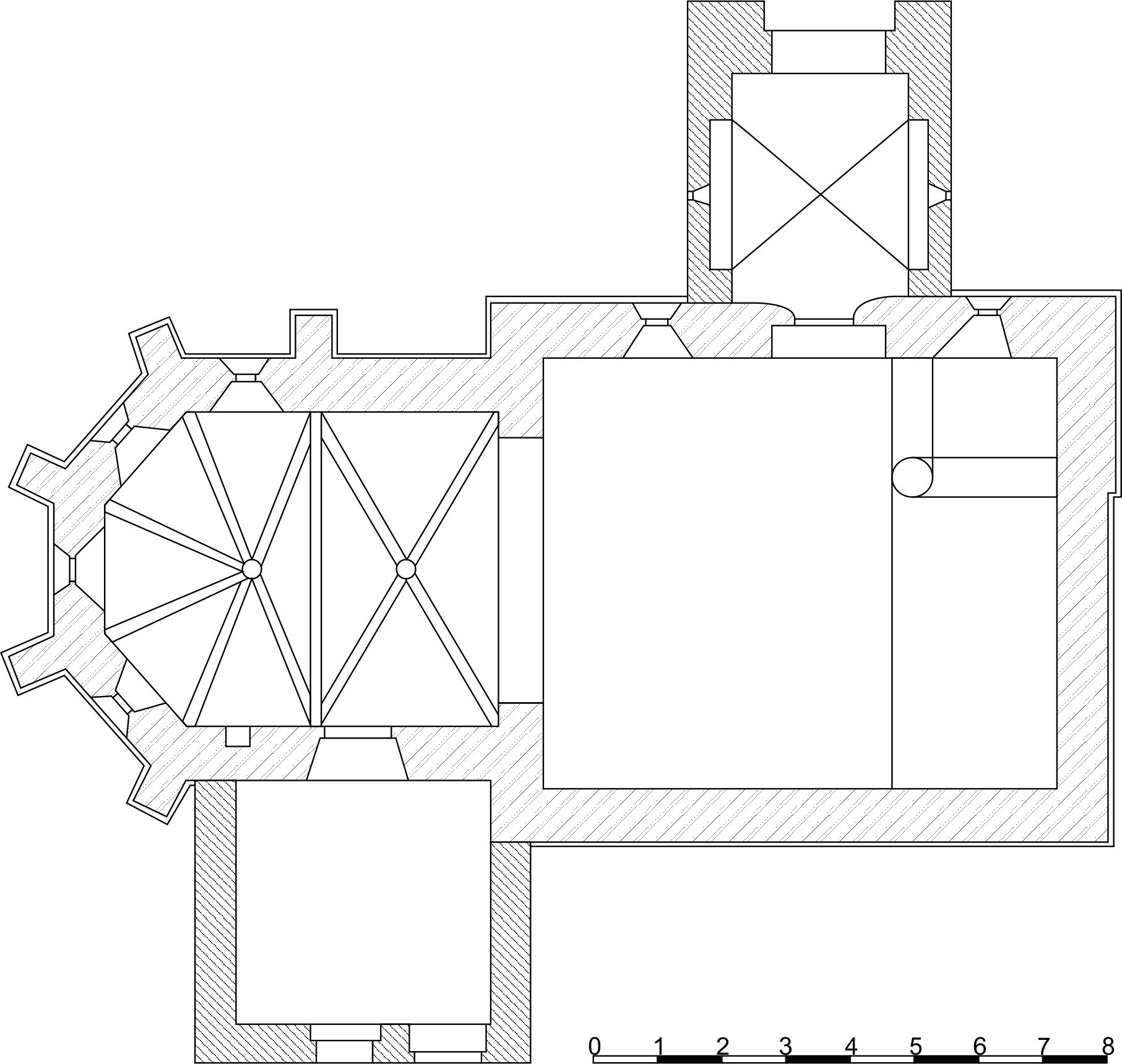 Součastný půdorys kostela